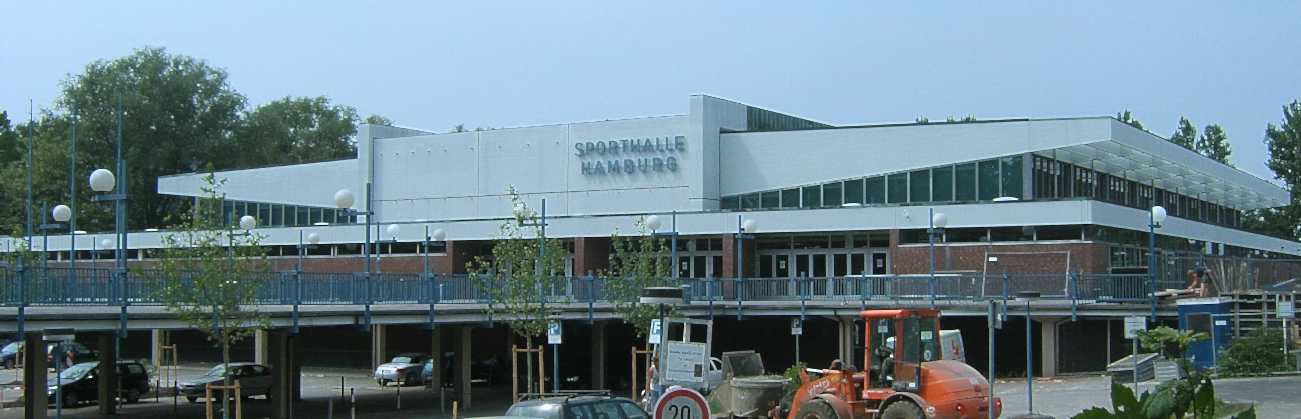 Hamburg, Alsterdorfer Sporthalle